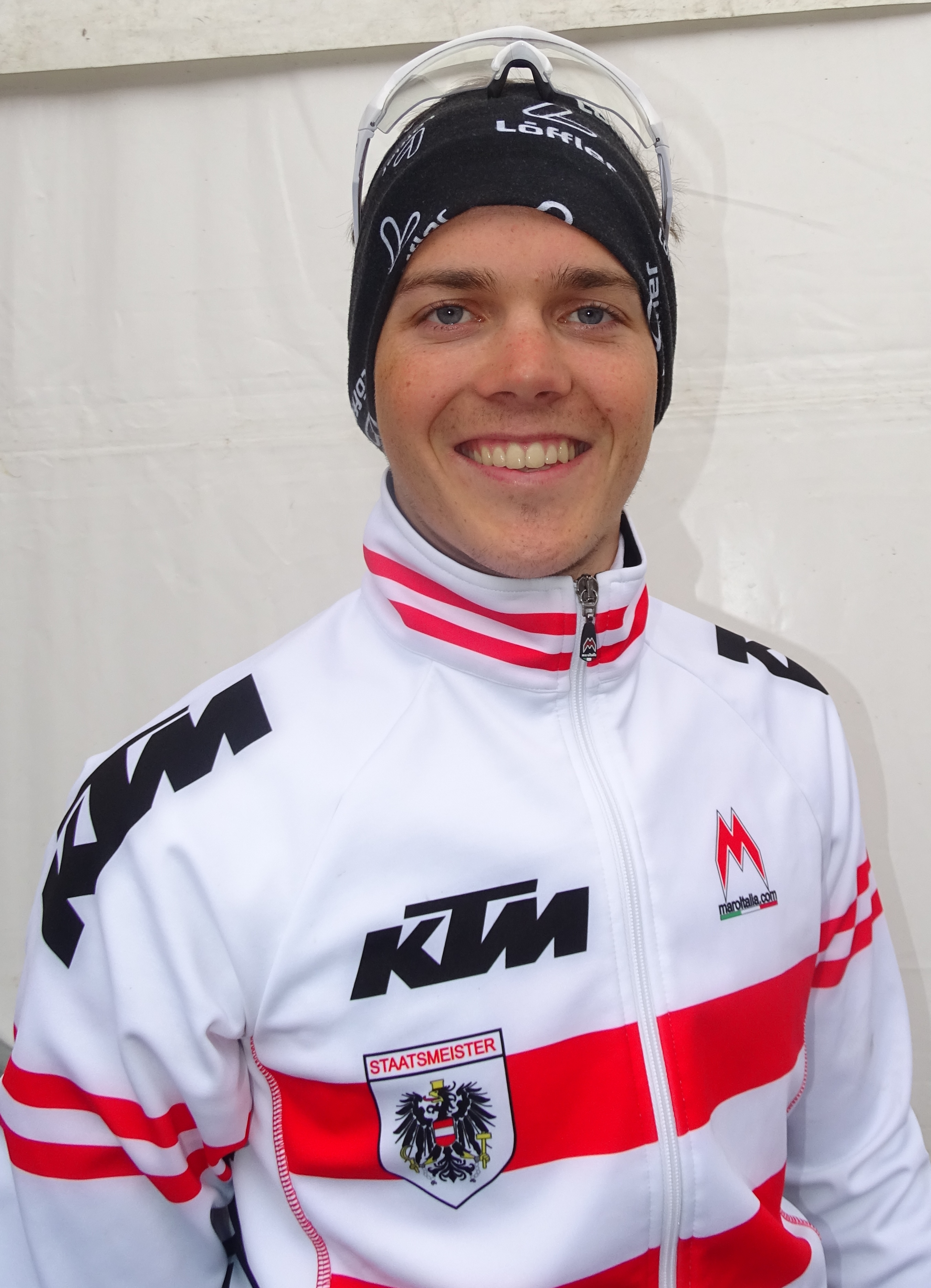 Reportage réalisé le samedi 11 avril à l'occasion du départ et de l'arrivée du Tour des Flandres espoirs 2015 à Audenarde, Belgique.